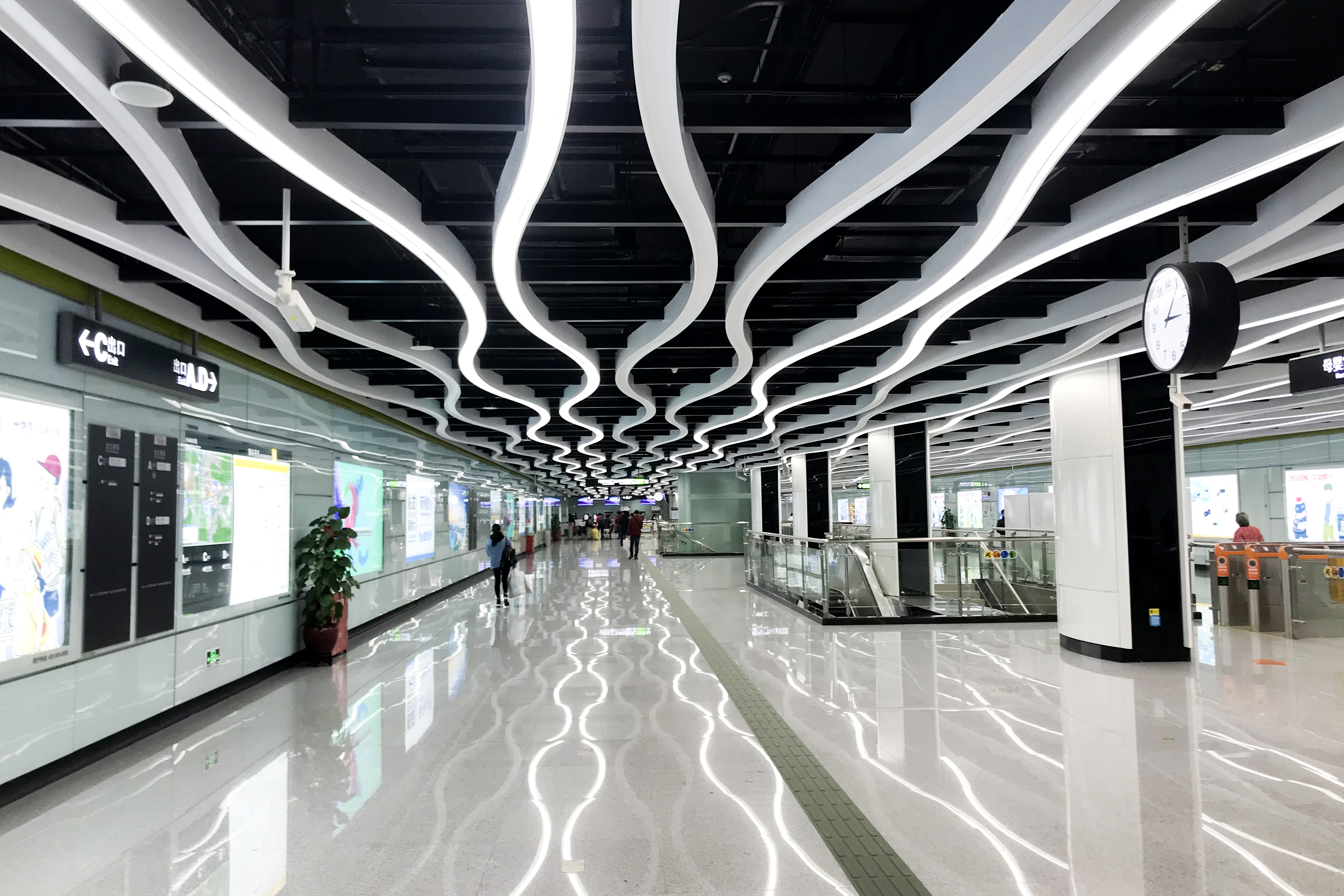 广州地铁新沙站